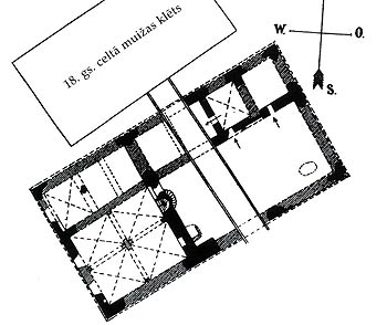 Löwis of Menari koostatud linnuseplaan, 1898 a.